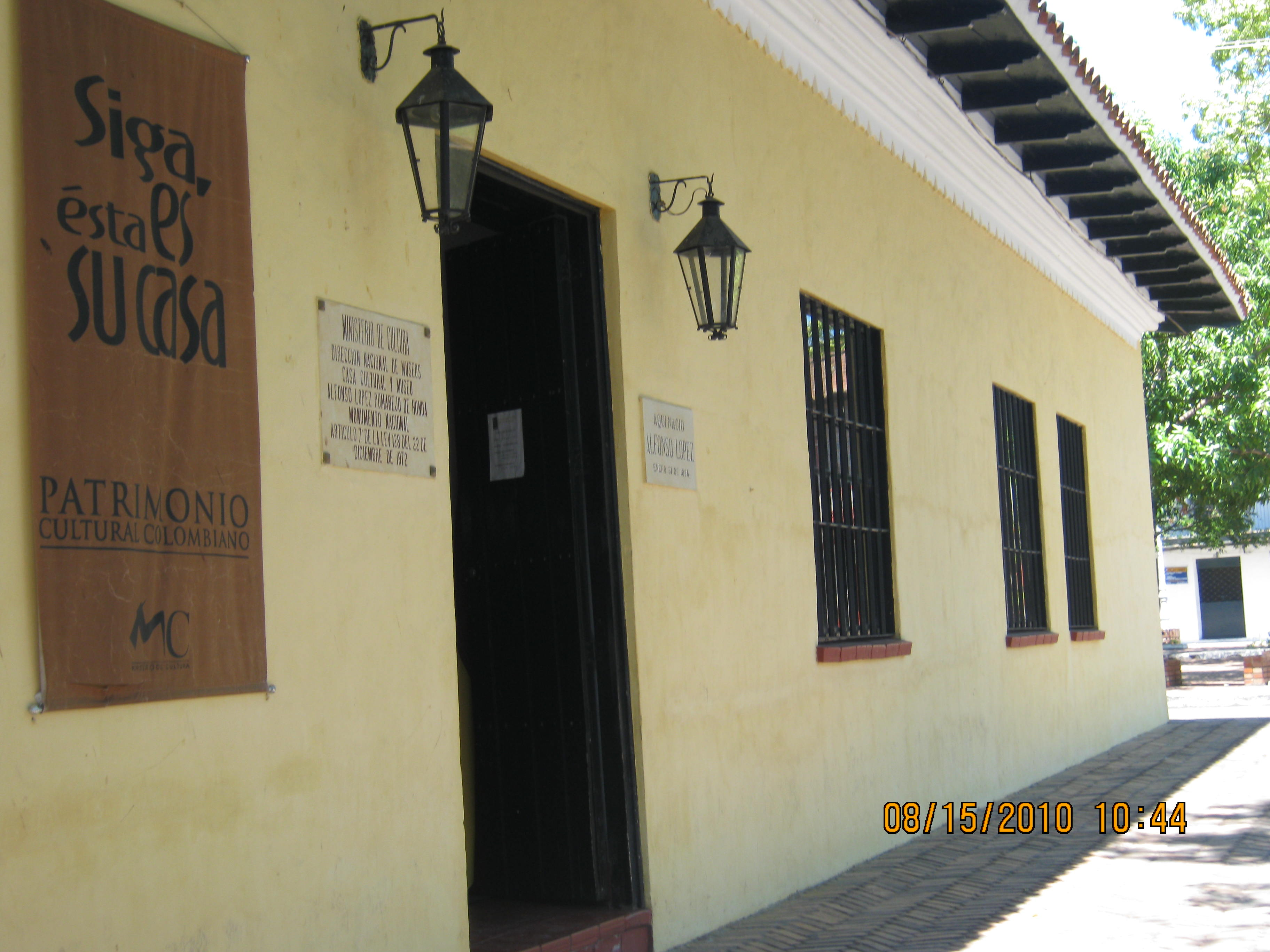 lugar del nacimiento del quien fue presidente de colombia en dos periodos: 1-) 1934-1938 2-)1942-1945 y fallecio el 20 de noviembre de 1959(inglaterra)